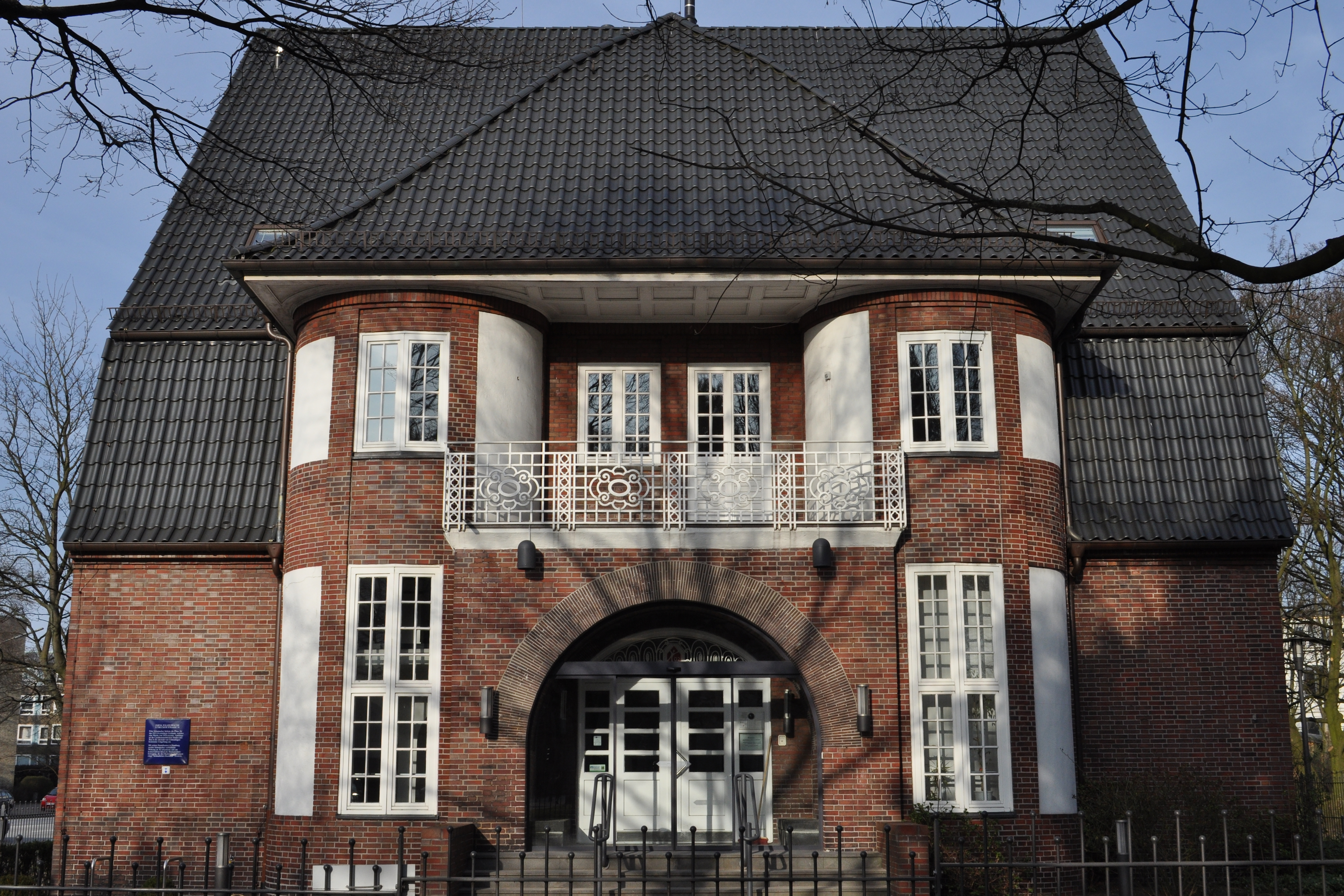 Ehemalige Polizeiwache Angerstraße 3 in Hamburg-Hohenfelde. This is a photograph of an architectural monument.